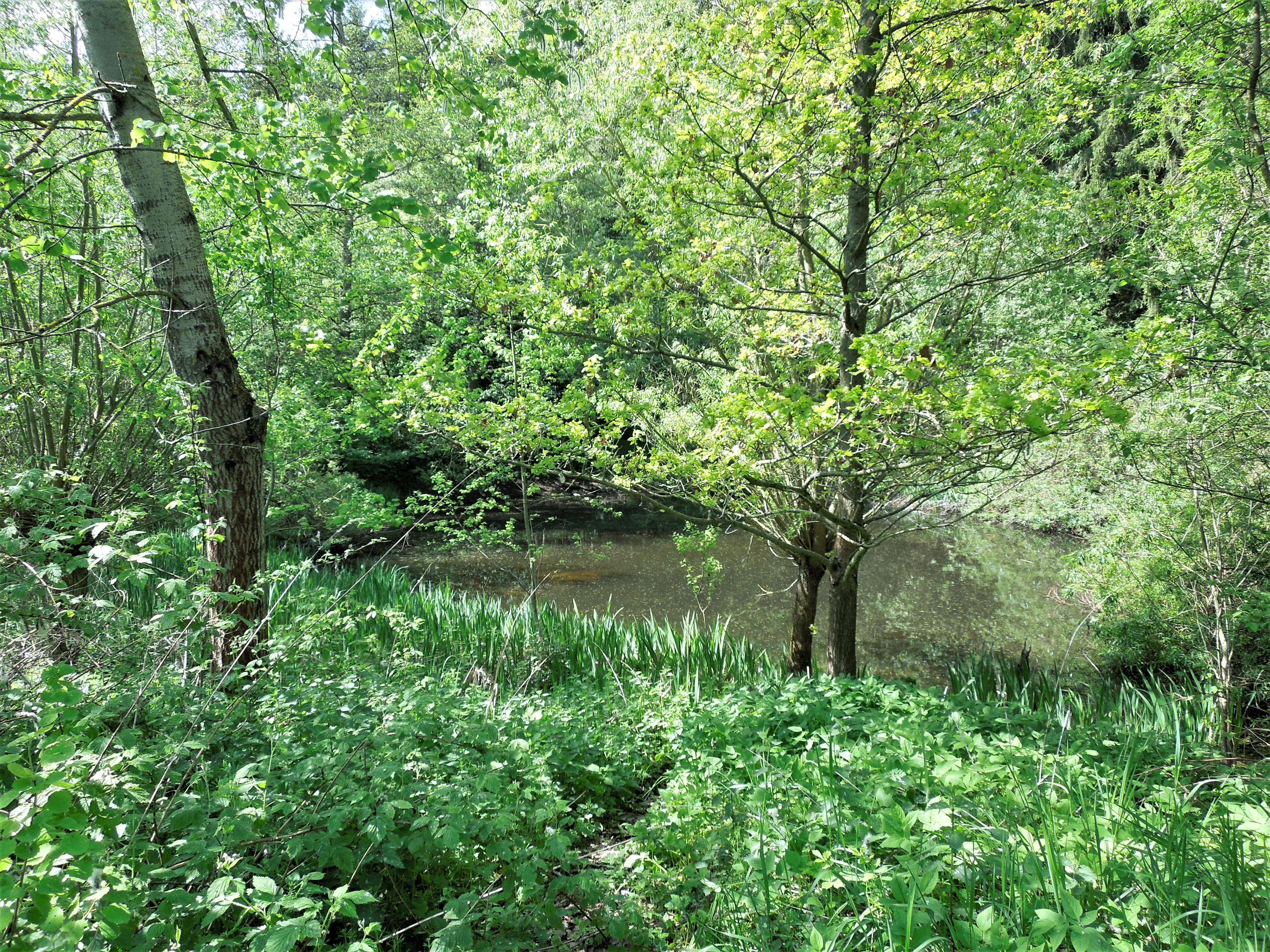 Das sogenannte Tonloch bei Elben. Ab September 1944 waren hier, im „Frauenlager im Tonloch“, von der Gestapo verhaftete Frauen, vom NS-Regime als „jüdische Mischlinge ersten Grades“ oder „jüdisch Versippte“ aus sogenannten privilegierten Mischehen bezeichnet, als Zwangsarbeiterinnen der Organisation Todt unter zutiefst menschenunwürdigen Bedingungen untergebracht.